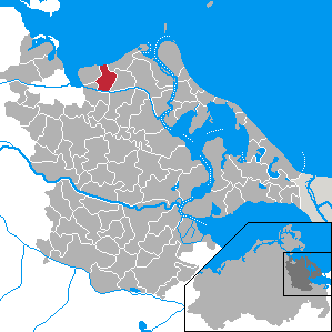 Brünzow, Landkreis Ostvorpommern, Mecklenburg-Vorpommern